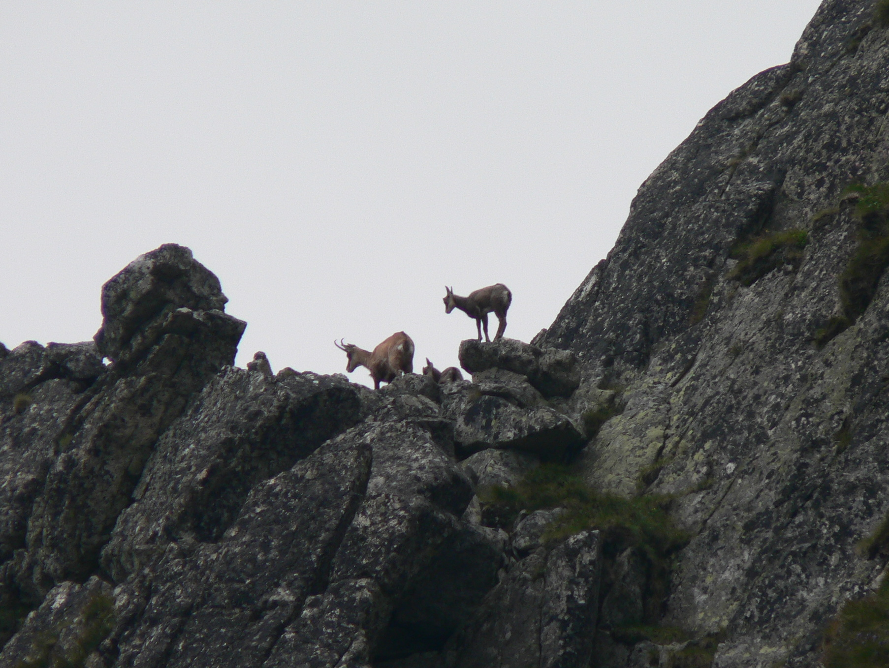 Kozica tatrzańska z młodym, zbocza Huncowskiego Szczytu